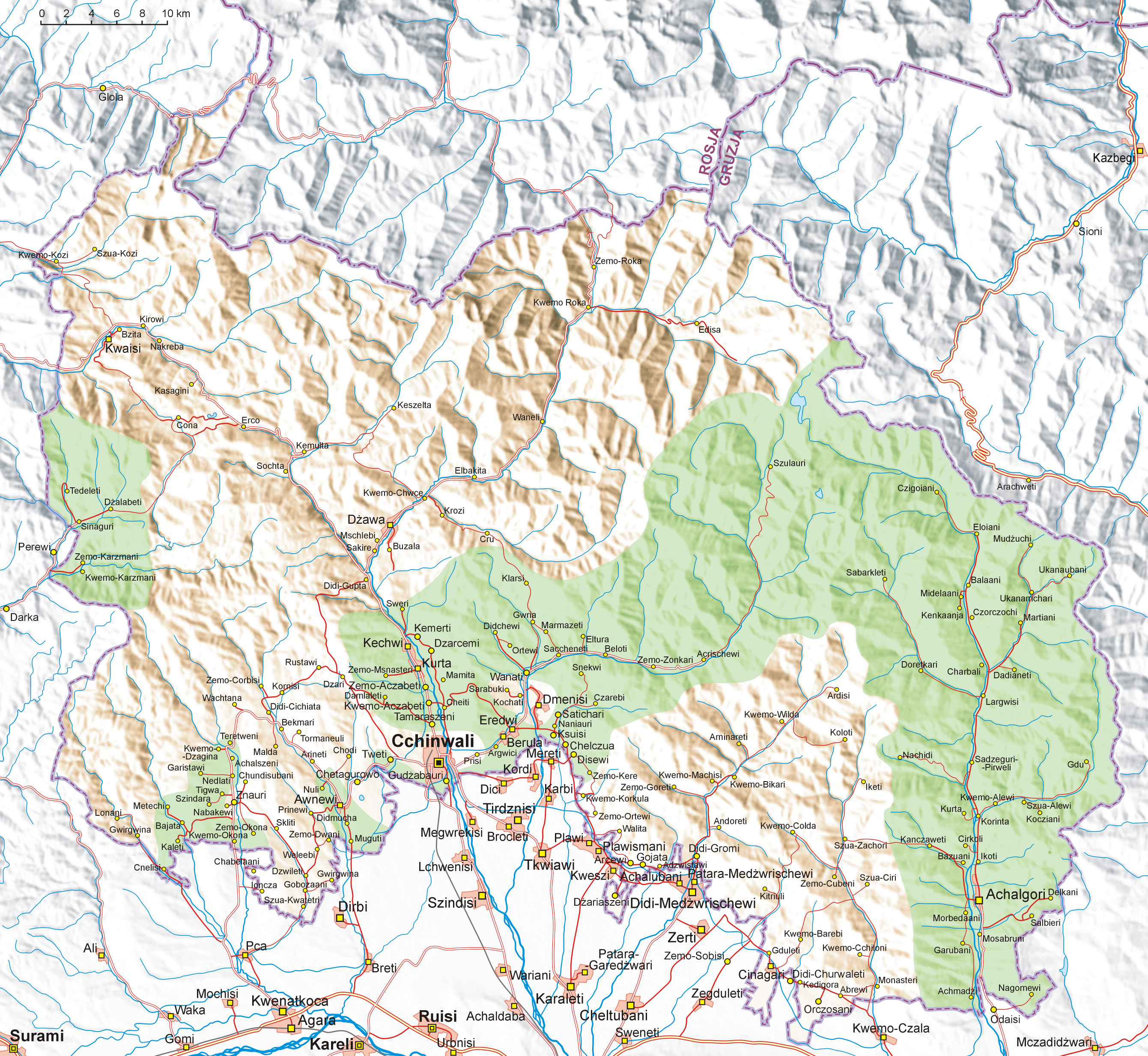 Mapa zasięgu terenów kontrolowanych przez siły progruzińskie w Osetii Południowej w przededniu wybuchu walk w 2008